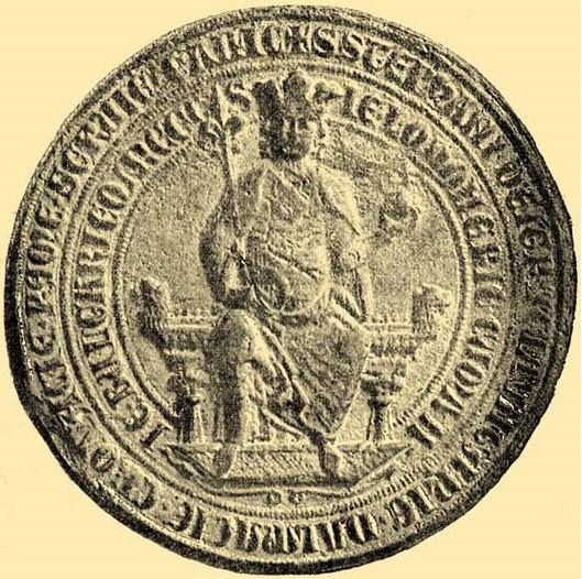 Pečeť Štěpána V.